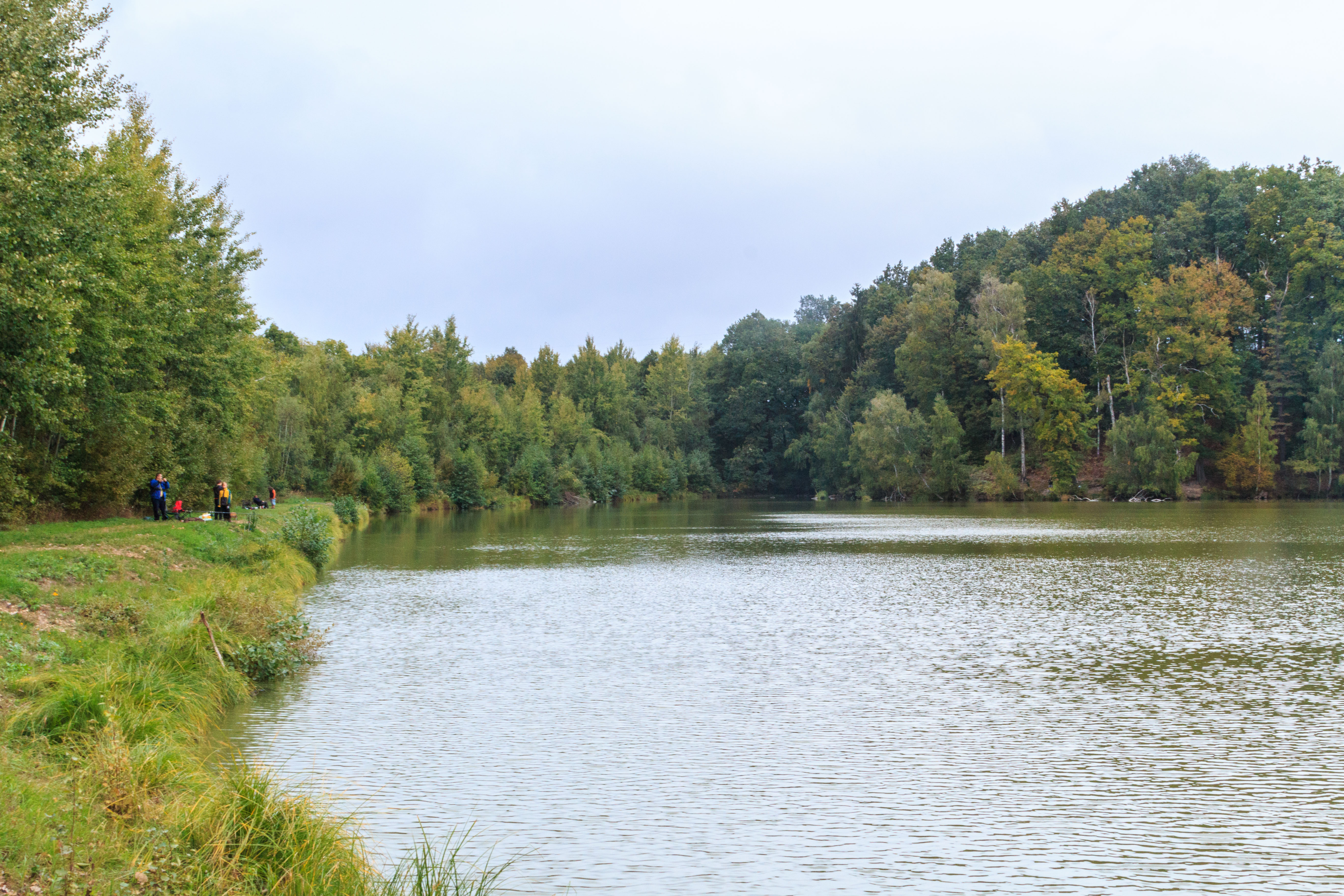 Rybník Metud Project: Vodstvo.